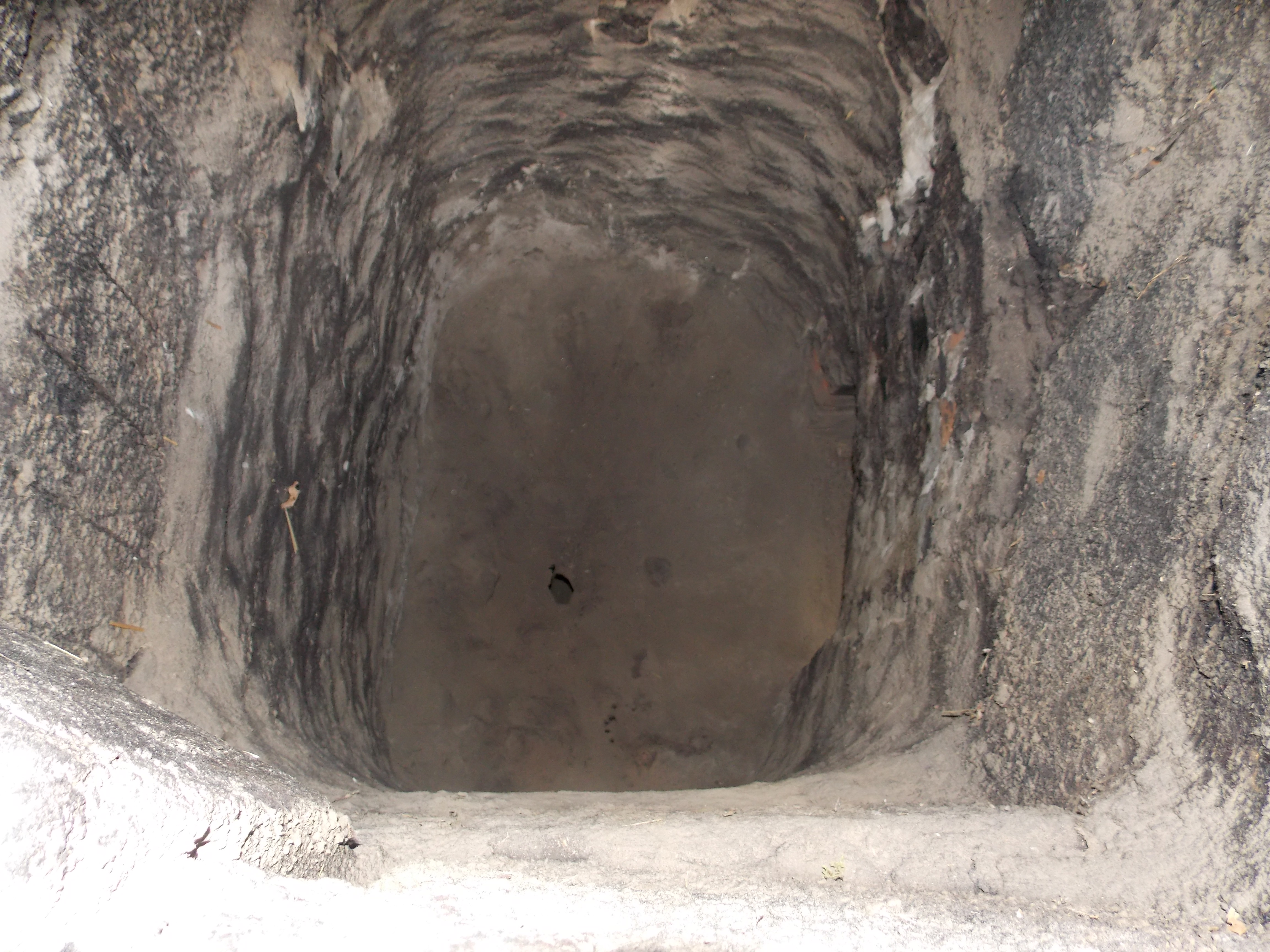 Sycyna budowa smolnego pieca, widoczny na dnie otwór przez który ścieka drzewna smoła.